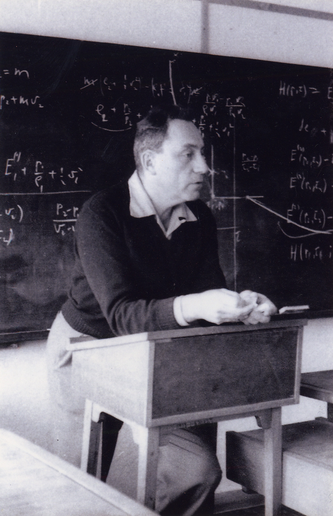 אברהם כוגן מלמד אויררונאוטיקה